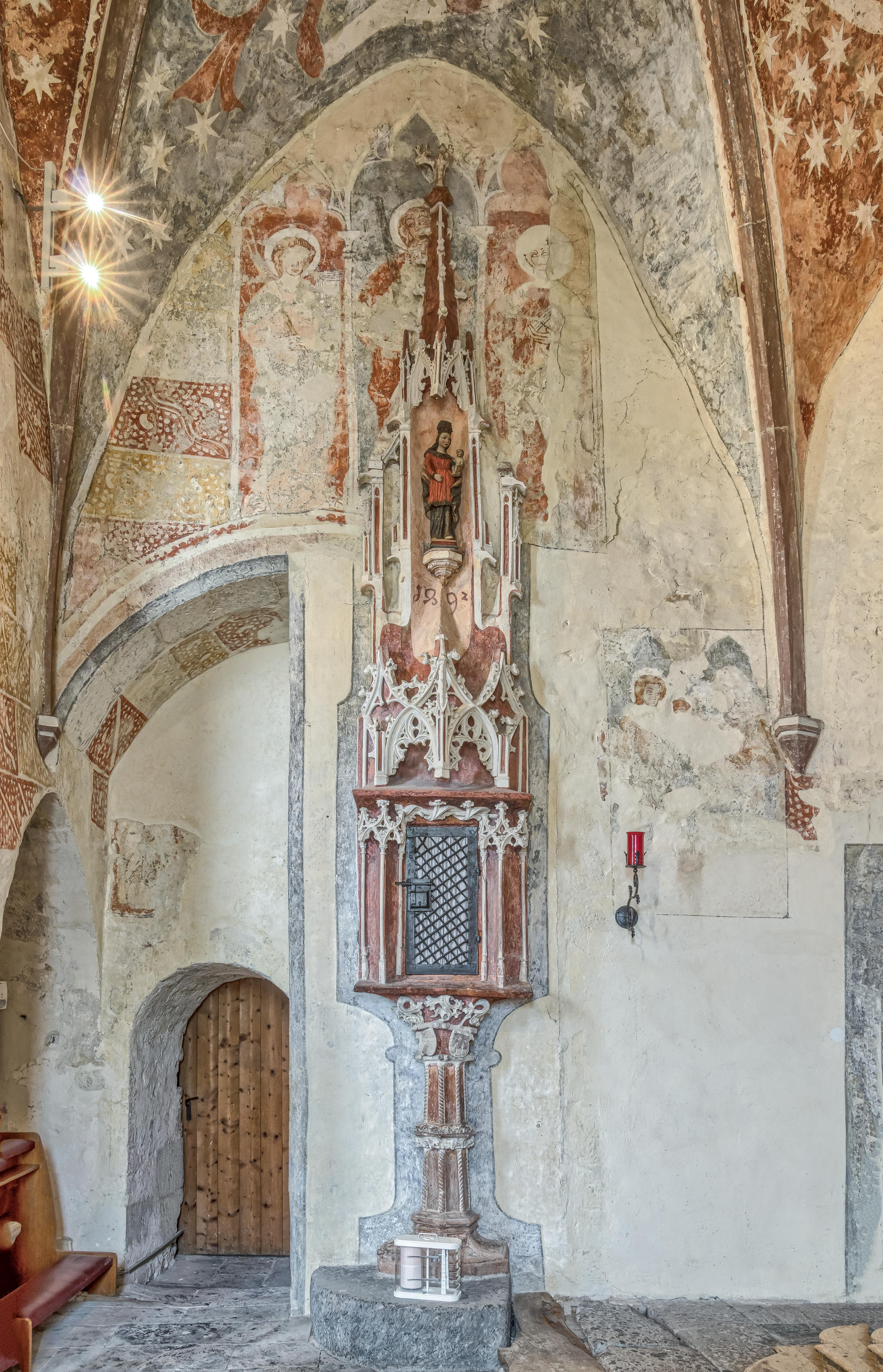 St. Michaelis in Niederrotweil Die Kirche ist einer der ältesten im Breisgau. Entstehung und Frühzeit ist nicht dokumentiert. Die frühromanische Bauform deutet auf das 11. Jahrhundert für dieses Bauwerk. Die erste Urkunde die die Kirche erwähnt stammt aus dem Jahre 1175. Die Kirche liegt am Badischen Teils des Jakobswegs von Rust nach Breisach